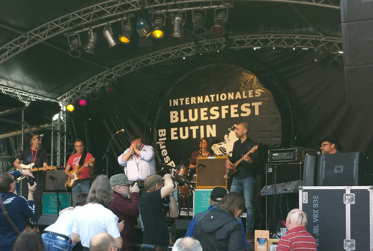 Eutin All Time Stars (Bluesband aus Eutin), Kreis Ostholstein, Schleswig-Holstein, Markt Eutin, 25. Bluesfest Eutin/BluesBaltica